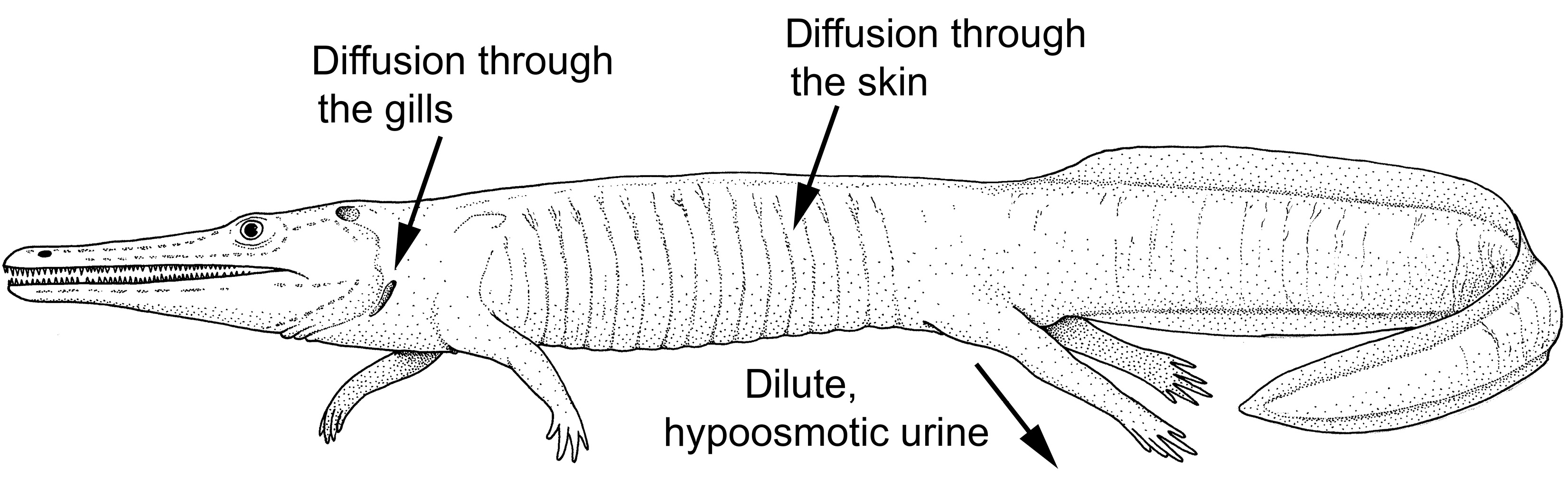 Water balance of the Archegosaurus model. Like extant freshwater fishes, Archegosaurus was probably hyperosmotic to its environment and gained water by diffusion through the skin and the gills; the osmotic influx of water had to be compensated for by the production of dilute, hypoosmotic urine by the kidneys.